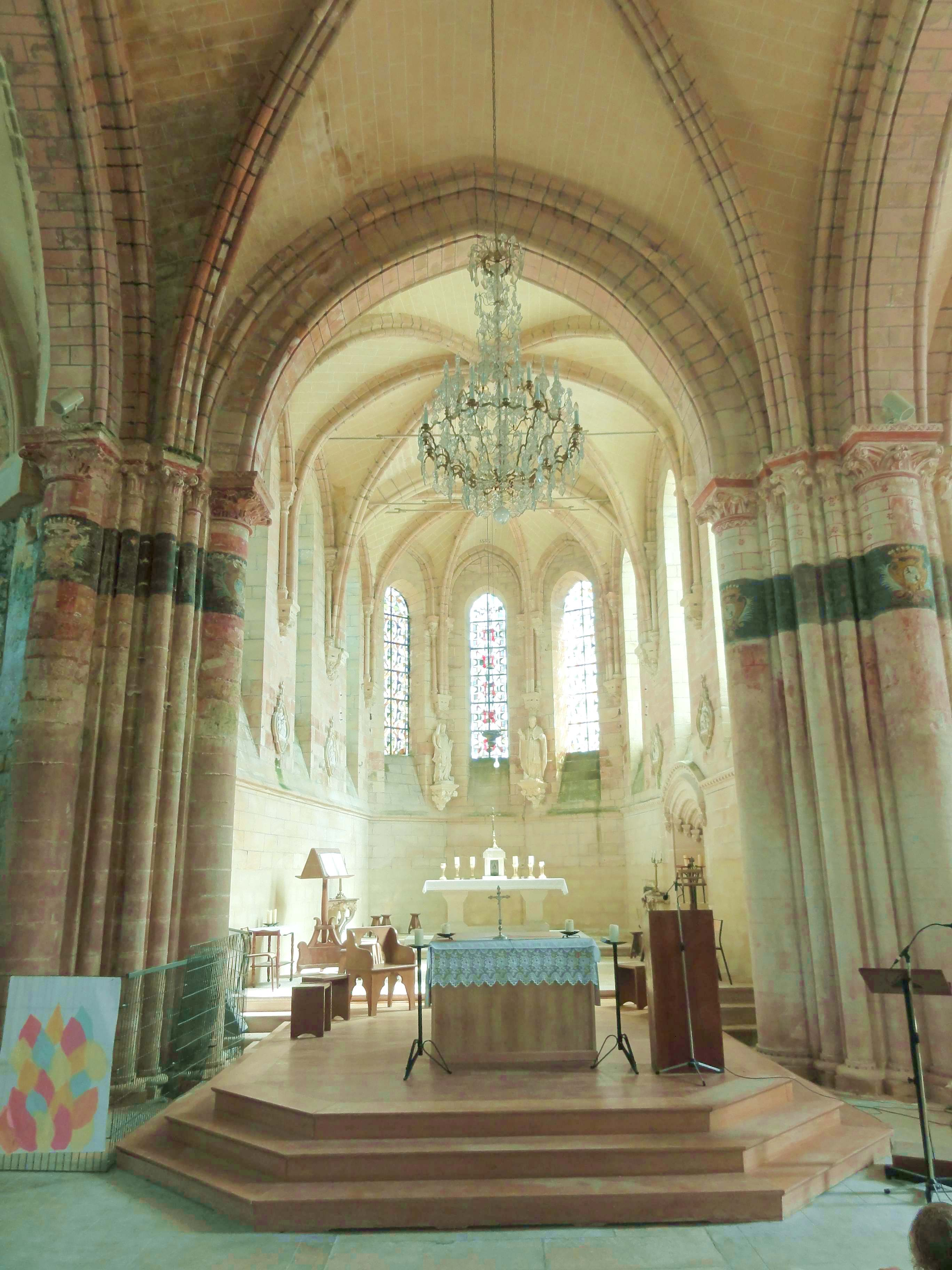 Intérieur de l'église (voir titre).